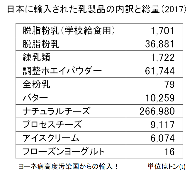 乳製品輸入量のデータ修正